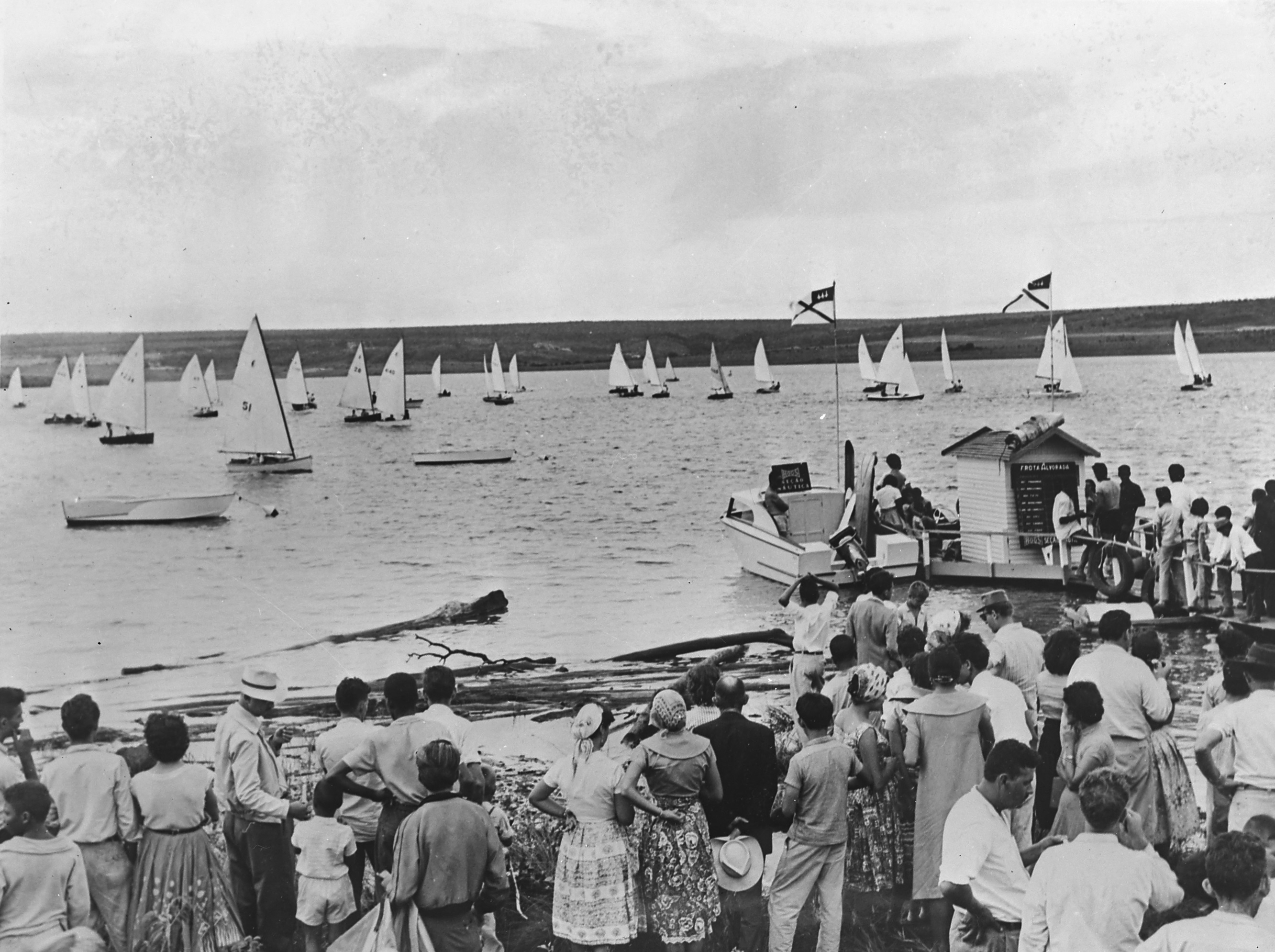 Imagem do Fundo Agência Nacional, do Arquivo Nacional